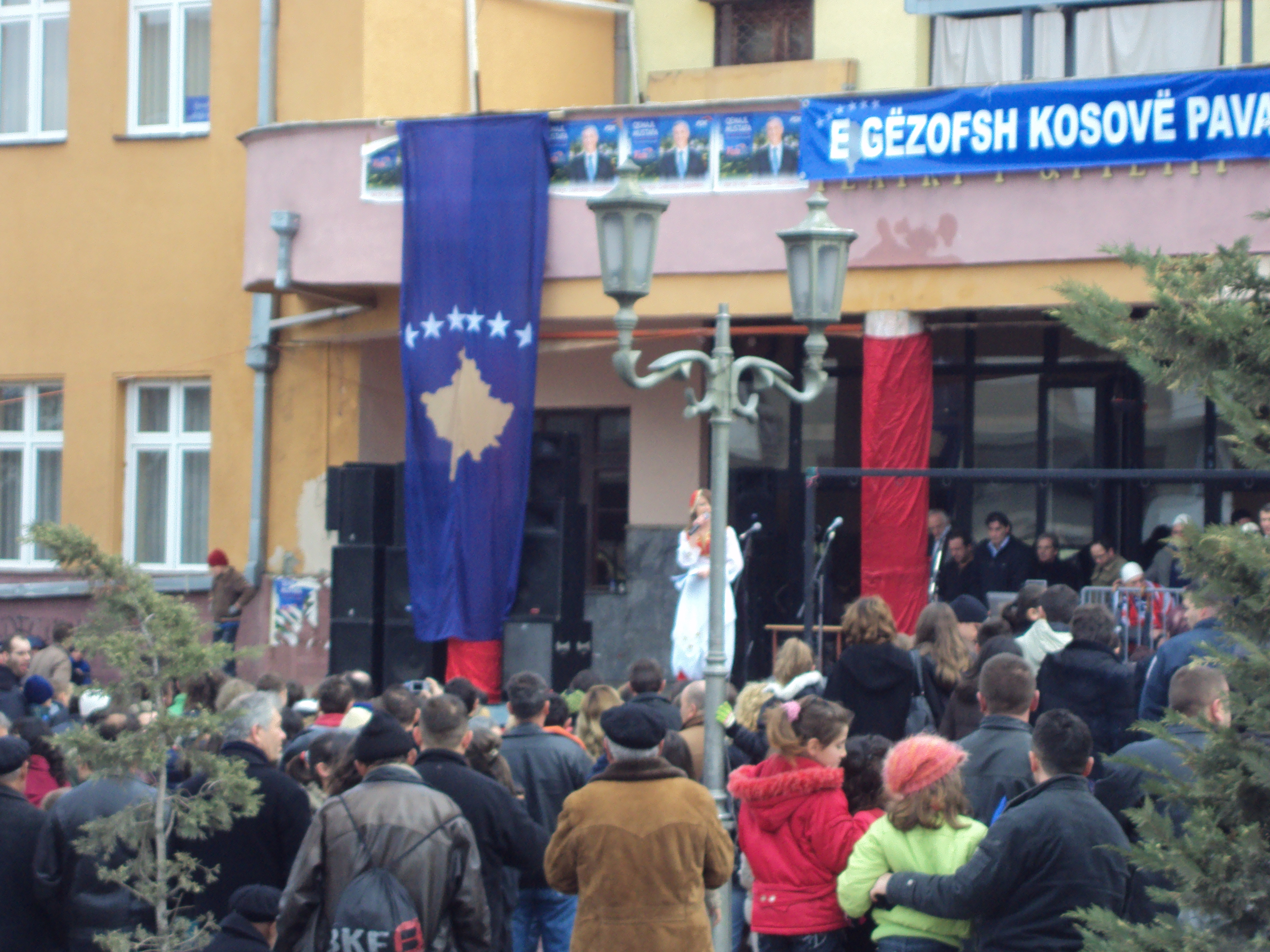 Gjilani, kremtimi